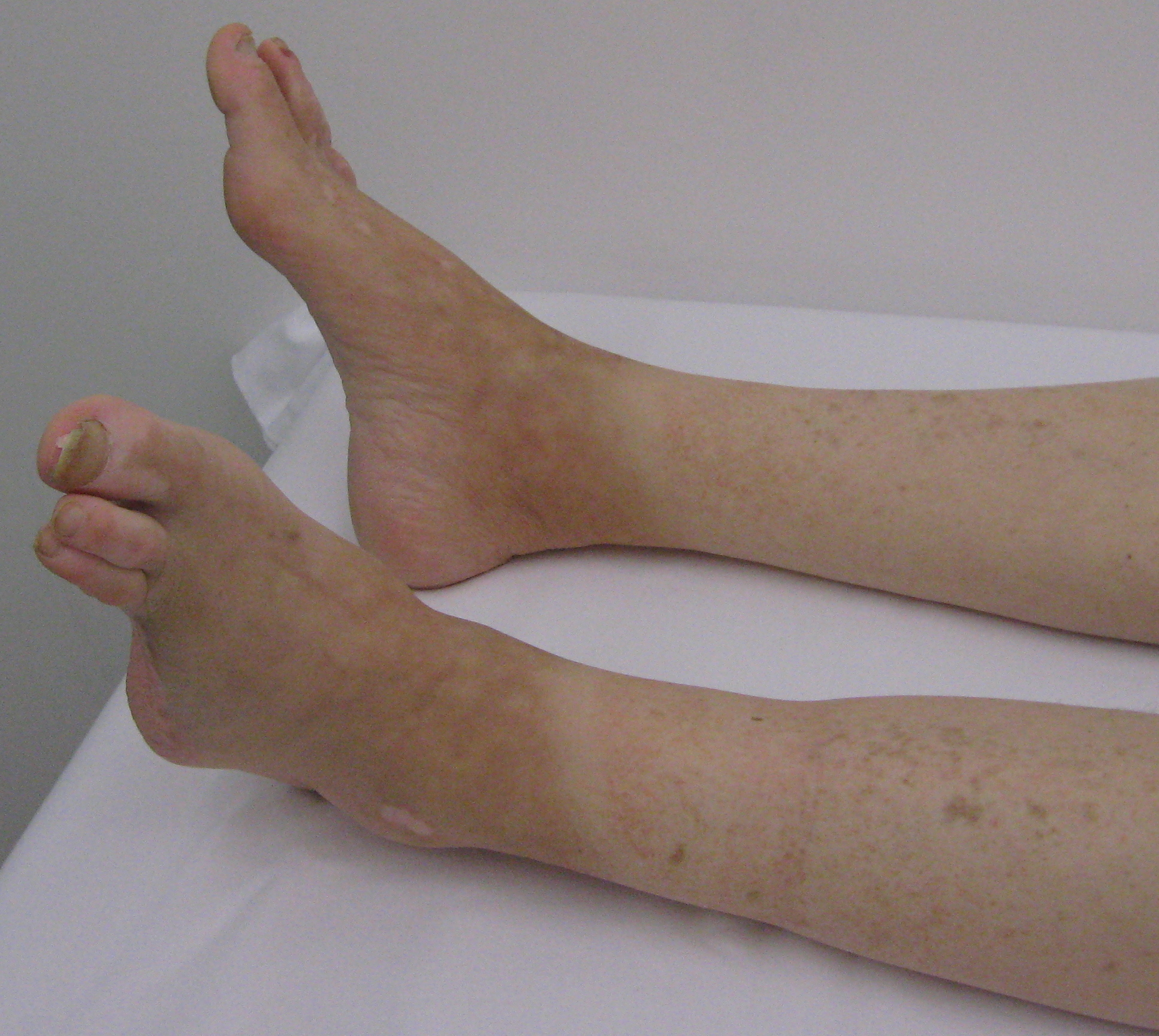 Amputacija prstiju je česta komplikacija dijabetesnog stopala, Autor dr.M Dimić, 2008.